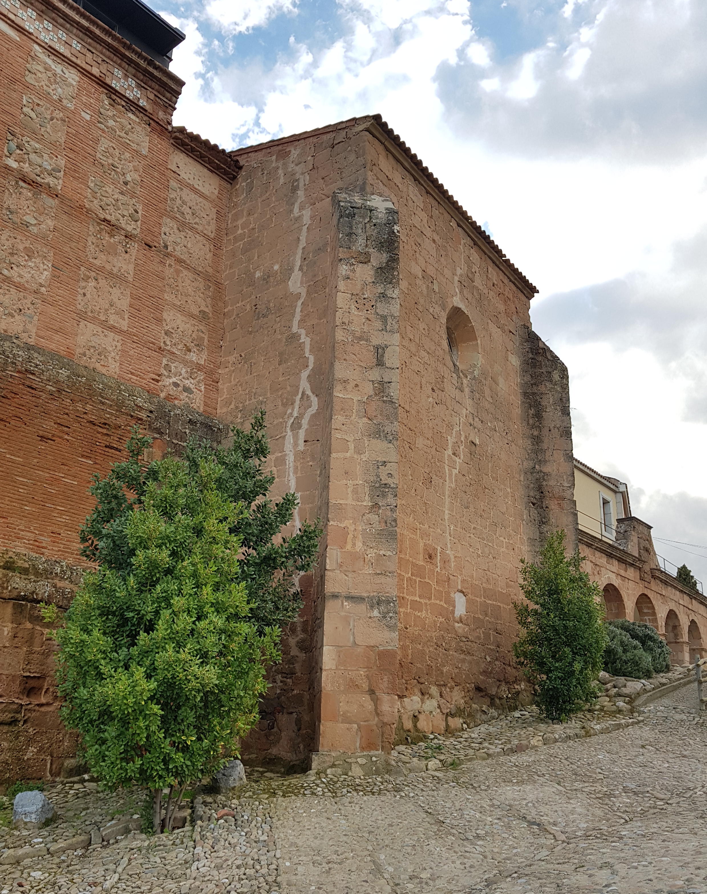 Vista de las grietas causadas por el terremoto de 1817, tal y como se ven aún hoy en día en la fachada del Monasterio de Vico en Arnedo (España).